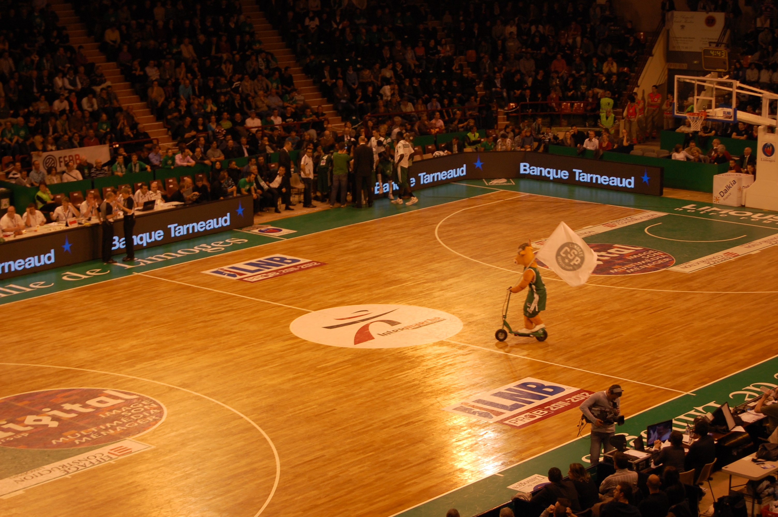 August', la mascotte du Limoges CSP à Beaublanc en avril 2012